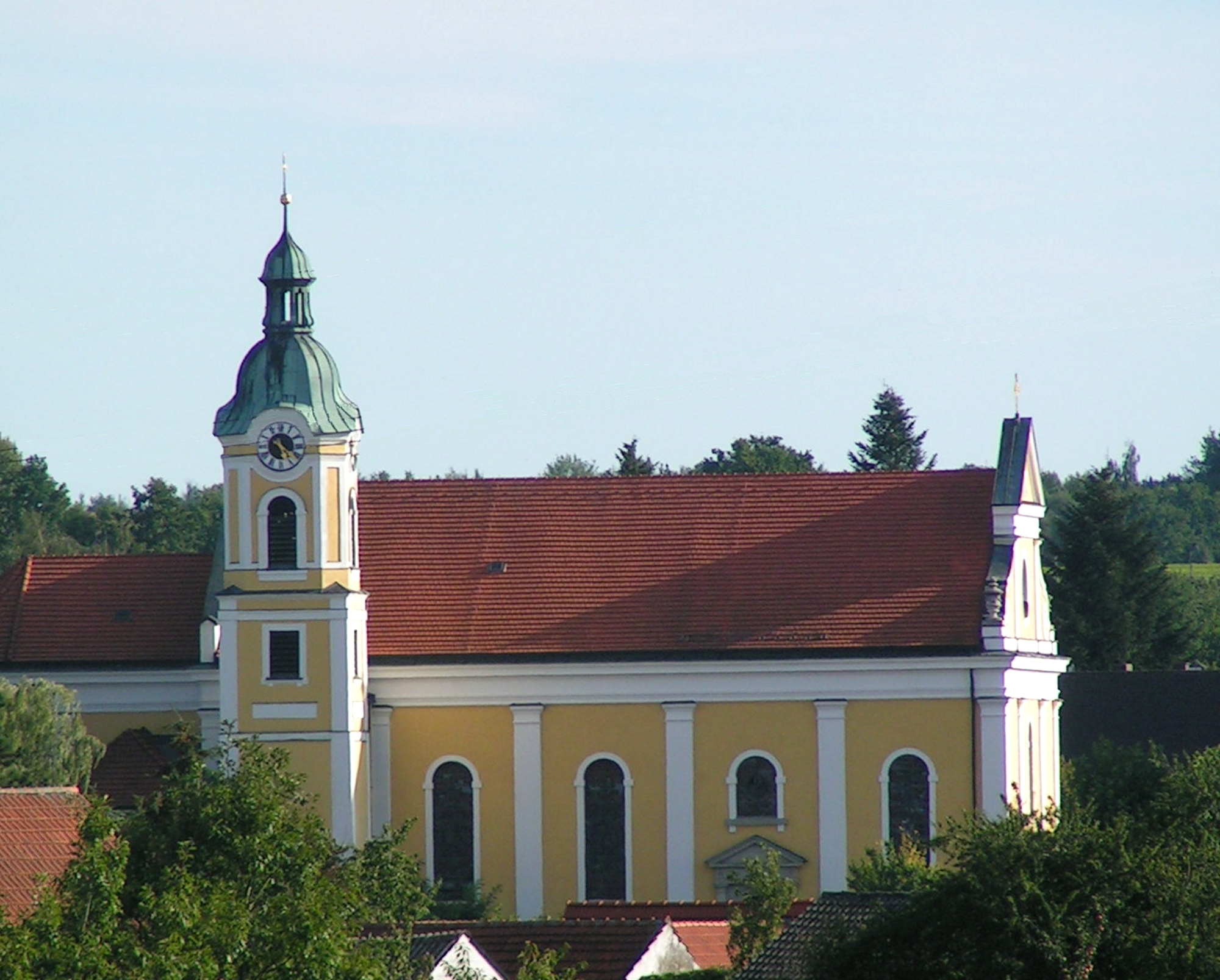 Siegenburg, Landkreis Kelheim, Niederbayern: Pfarrkirche St. Nikolaus